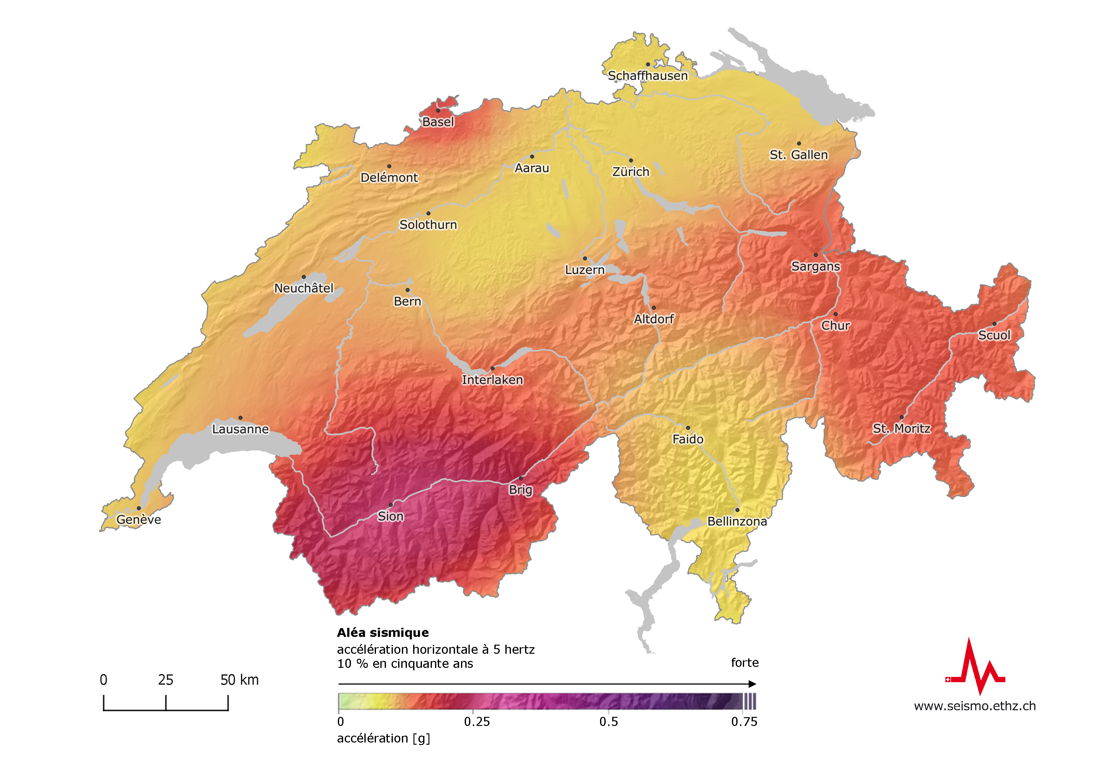 Carte de risque séismiques de la Suisse